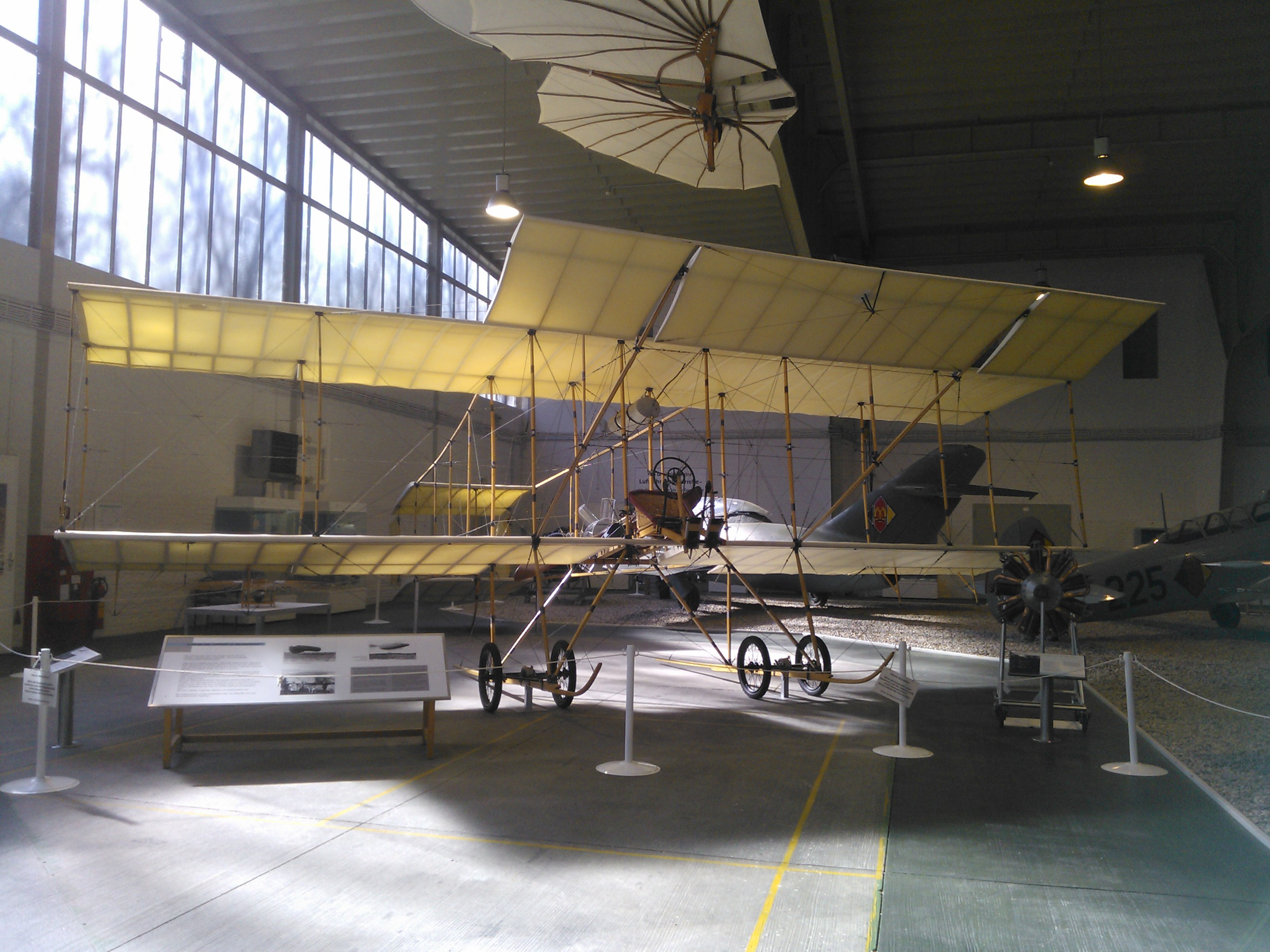 Nachbau einer Farman III (erstes deutsches Militärflugzeug 1910) im Militärhistorischen Museum der Bundeswehr in Berlin Gatow